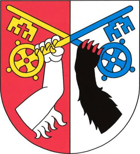 Trubín, znak. V červeno-stříbrně polceném štítě zkřížené zlato-modře polcené klíče zdola držené tlapami odvráceně ohnutých nohou, vpravo stříbrnou lví se zlatou zbrojí, vlevo černou medvědí s červenou zbrojí.